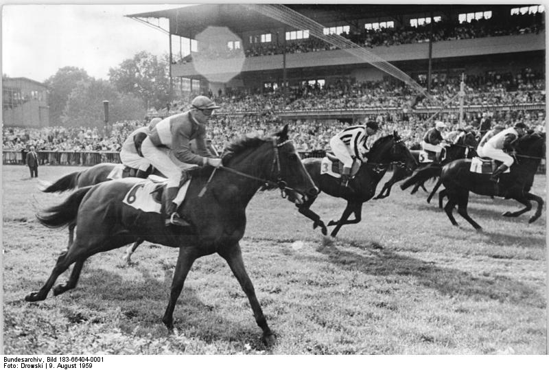 Berlin, Galopprennbahn, Start, Egon Czaplewski Zentralbild Drowski 9.8.1959 FSo.-Eb. "Großer Preis der DDR" in Hoppegarten In Hoppegarten kam am Sonntag, dem 9.8.1959 der "Große Preis der DDR" über 2400 m mit einer Dotierung von 80000.- DM zur Austragung. Das "Derby der DDR" gewann "Fahnenträger" aus dem VE-Gestüt Gürlsdorf mit Meisterjockey Egon Czaplewski im Sattel. UBz:Start-vorn mit der Nummer 6 "Fahnenträger".